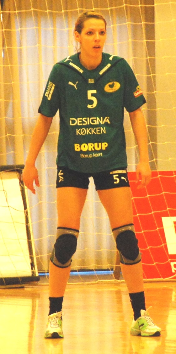 Den østrigske håndboldspiller Gorica Aćimović.